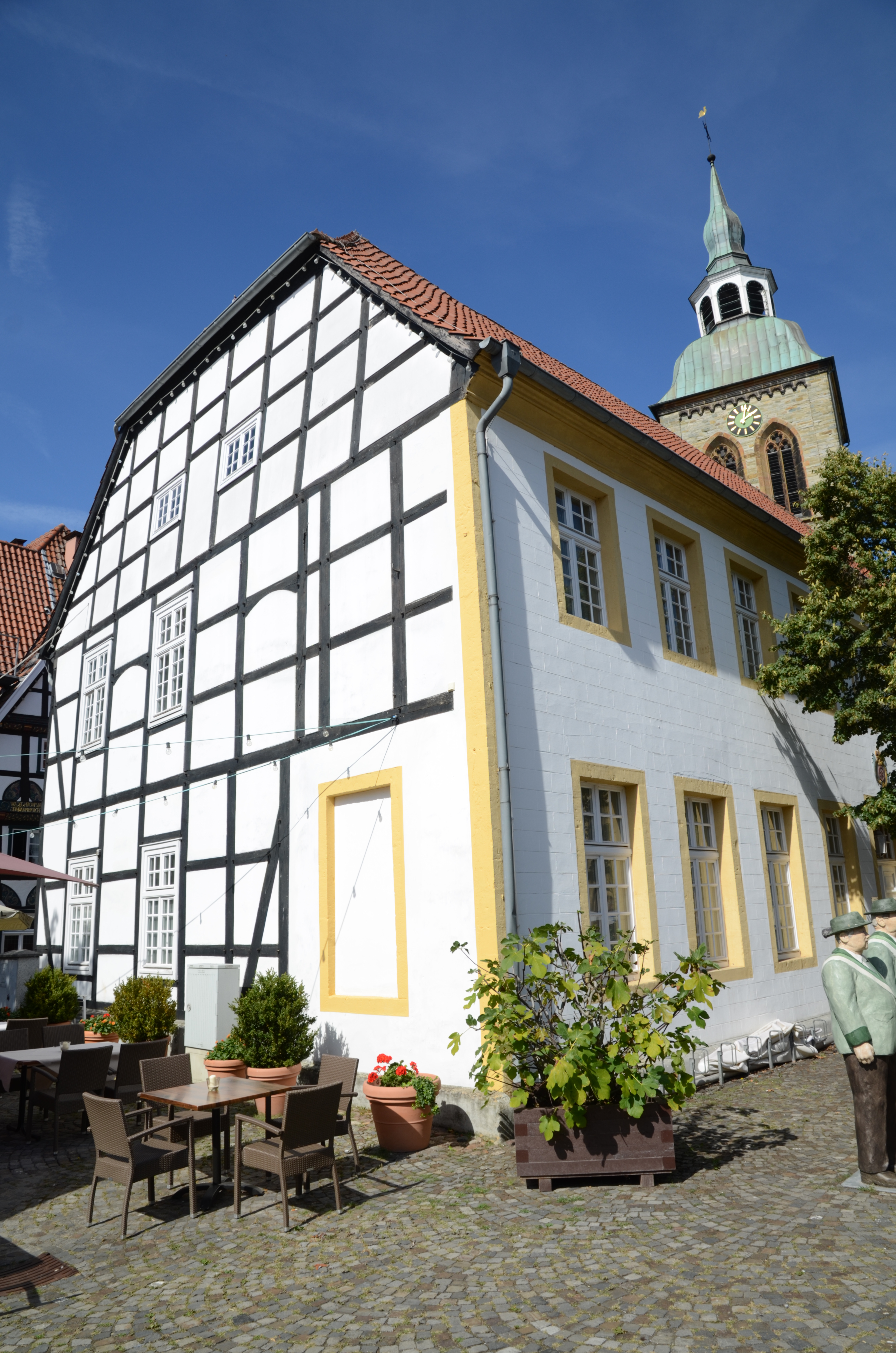 Wiedenbrück Rathaus